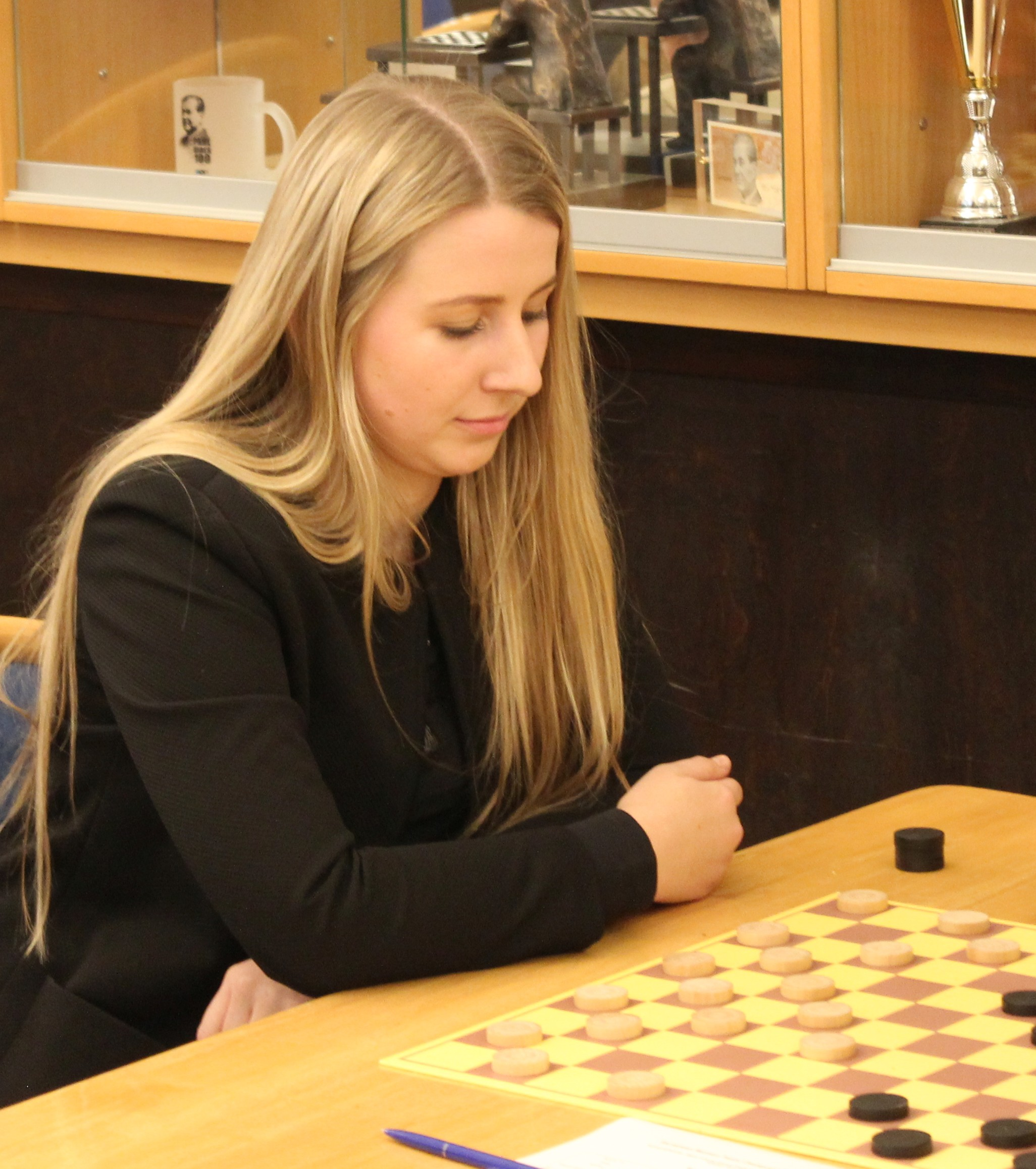 Joanna Sild Euroopa võistkondlikel meistrivõistlustel välkkabes